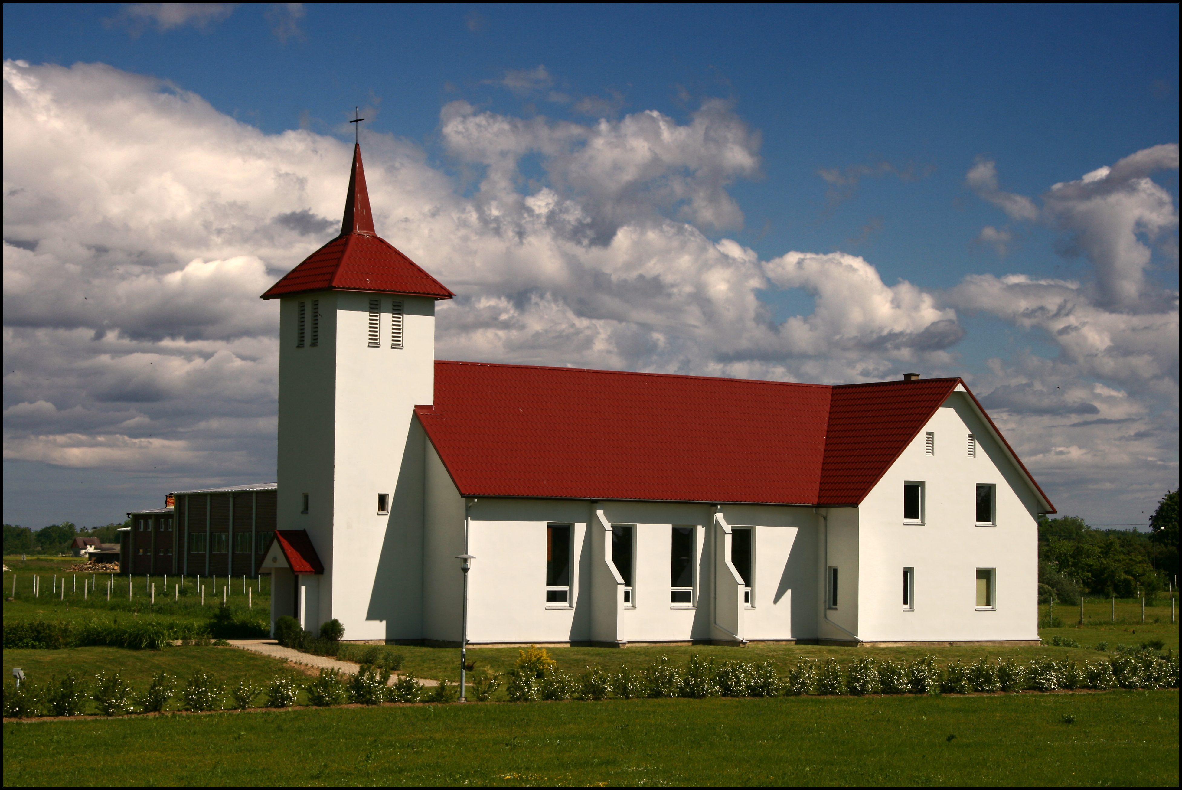 Emburga church